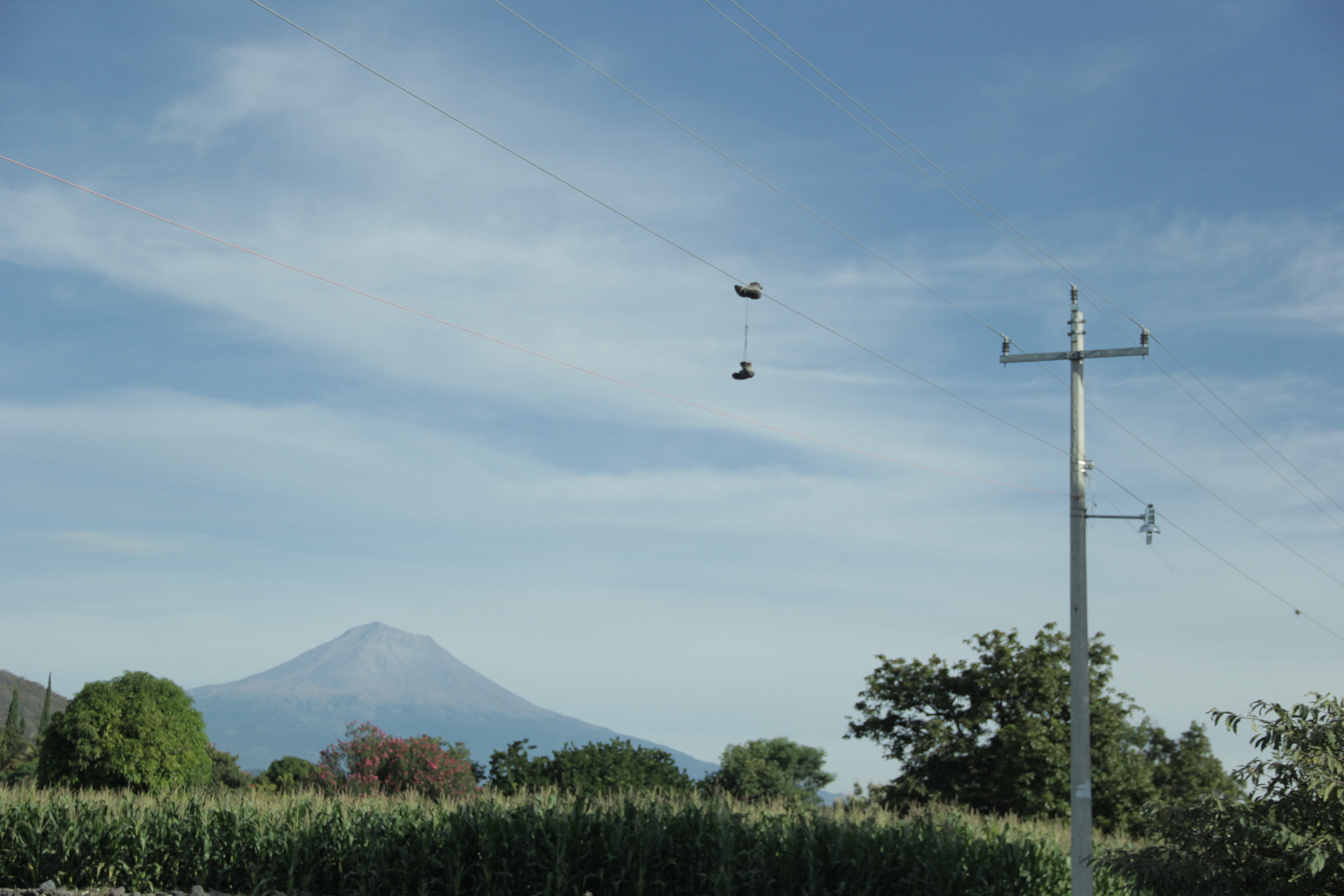 Vista del volcán desde el municipio de Tlapanalá, Puebla.